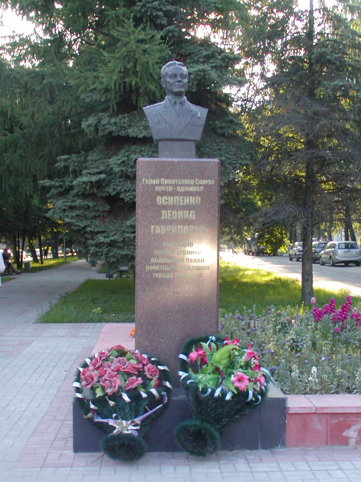 Бюст Леонида Гавриловича Осипенко в Обнинске.